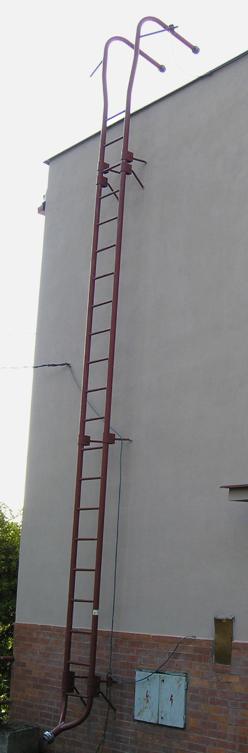 Suchovod